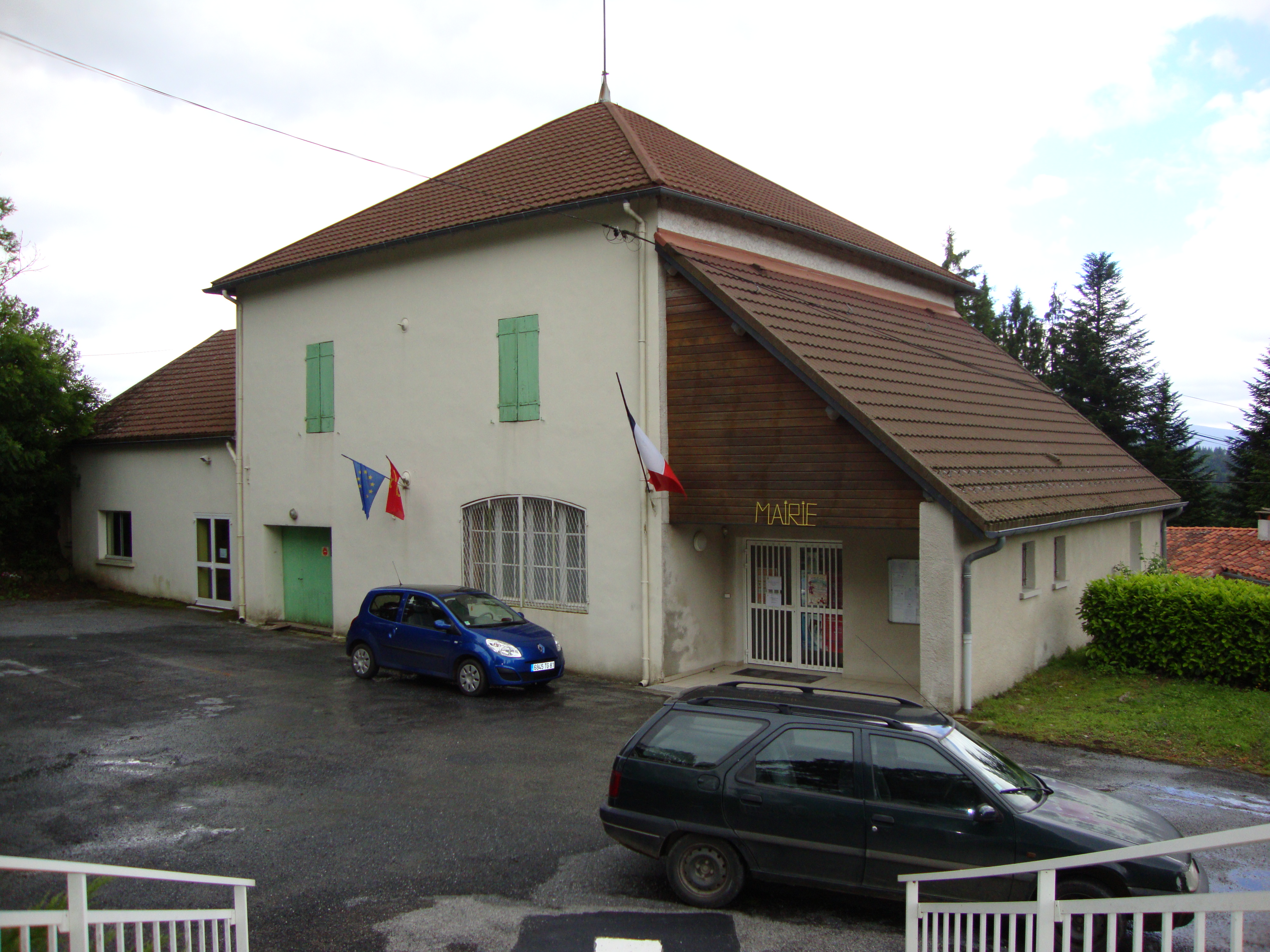 Le Rialet (Tarn, Fr) mairie.